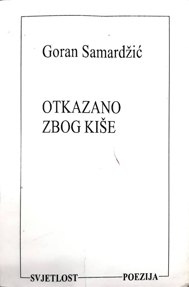 Naslovna strana zbirke Otkazano zbog kiše pisca i pjesnika Gorana Samardžića